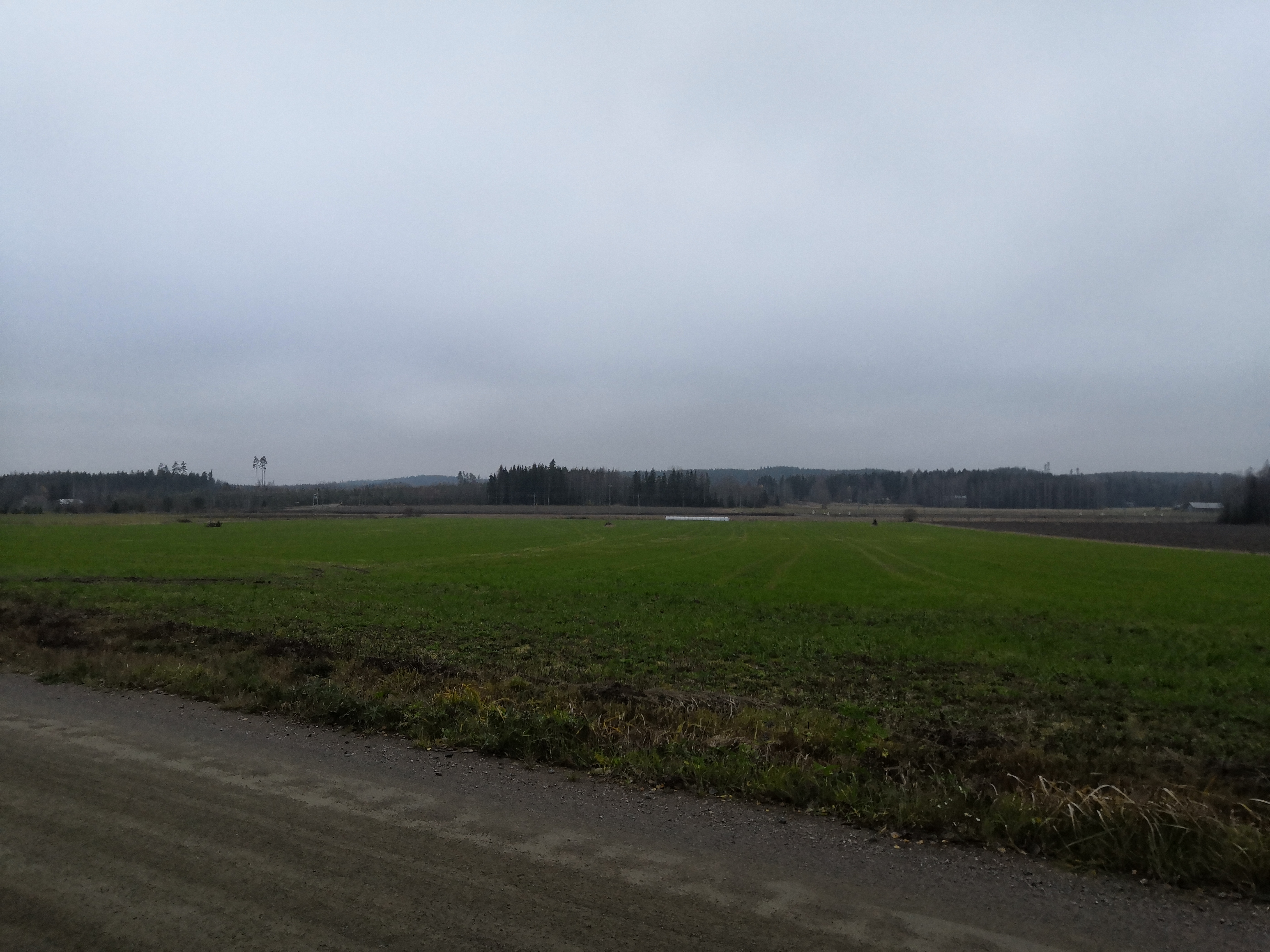 Syksyinen ja sumuinen peltomaisema Inginmaalla (Koria)